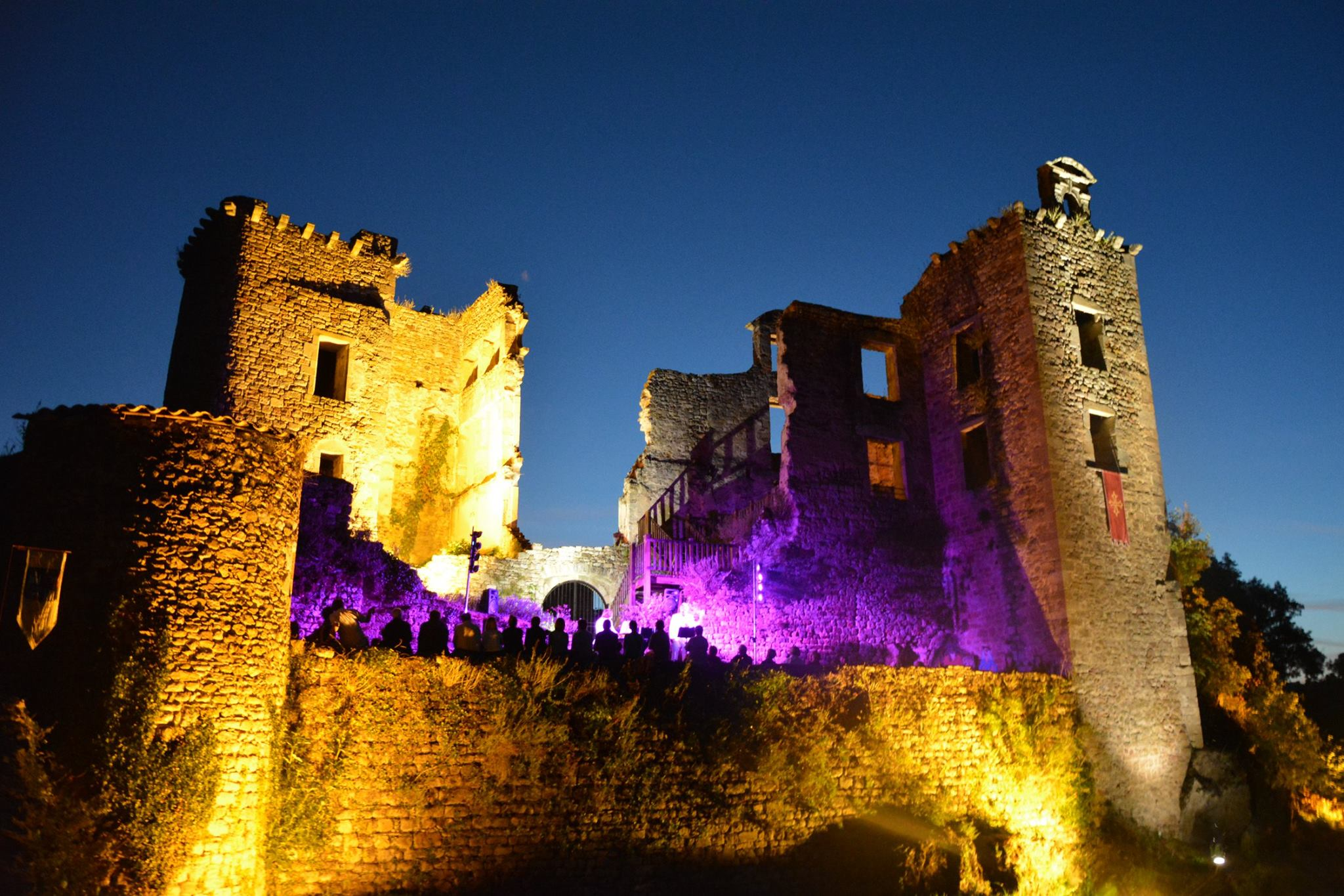 Vue de nuit du Chateau de Saint Martin Laguépie éclairé